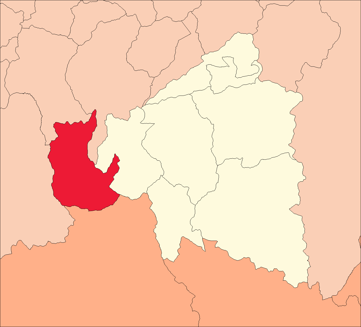 Área del distrito de Colpas.